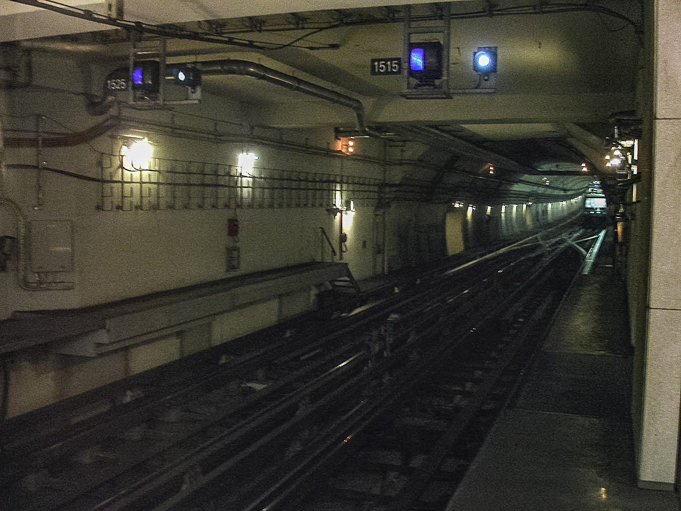 Retournement d'une rame MP 89 CA après la station Olympiades de la ligne 14 du métro de Paris, France